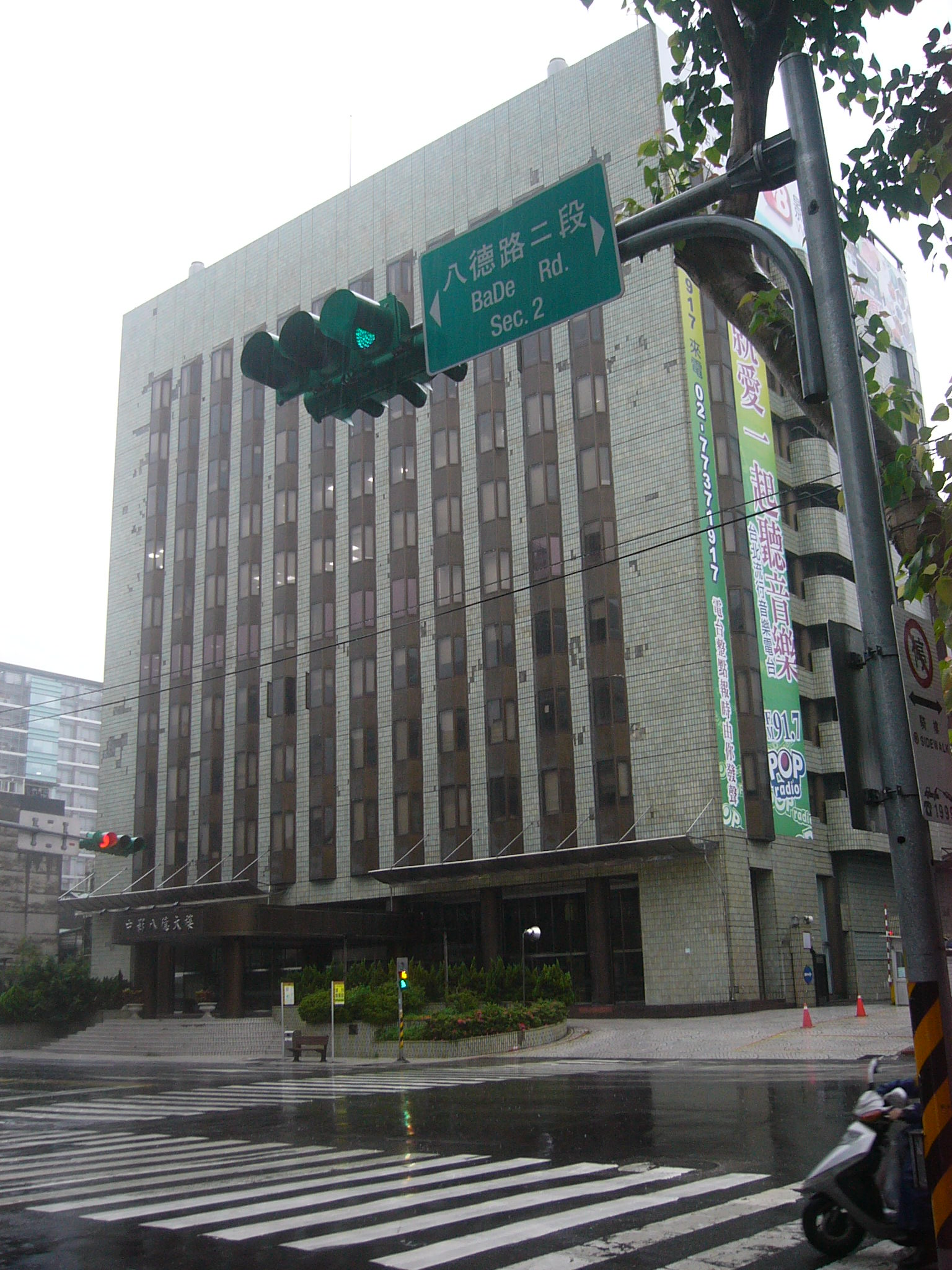 位於臺北市中山區八德路二段的「中影八德大樓」，原名「華夏大樓」，是《中央日報》末代總社。 Bân-lâm-gú: 佇臺北市中山區八德路二段的「中影八德大樓」本來叫「華夏大樓」，是《中央日報》的末尾總社。Tī Tâi-pak-tshī Pat-tik-lōo ê Tiong-iánn Pat-tik Tuā-lâu pún-lâi kiò Huâ-hā Tuā-lâu. Sī Tiong-iong Ji̍t-pò e bua̍t-bué tsóng-siā.